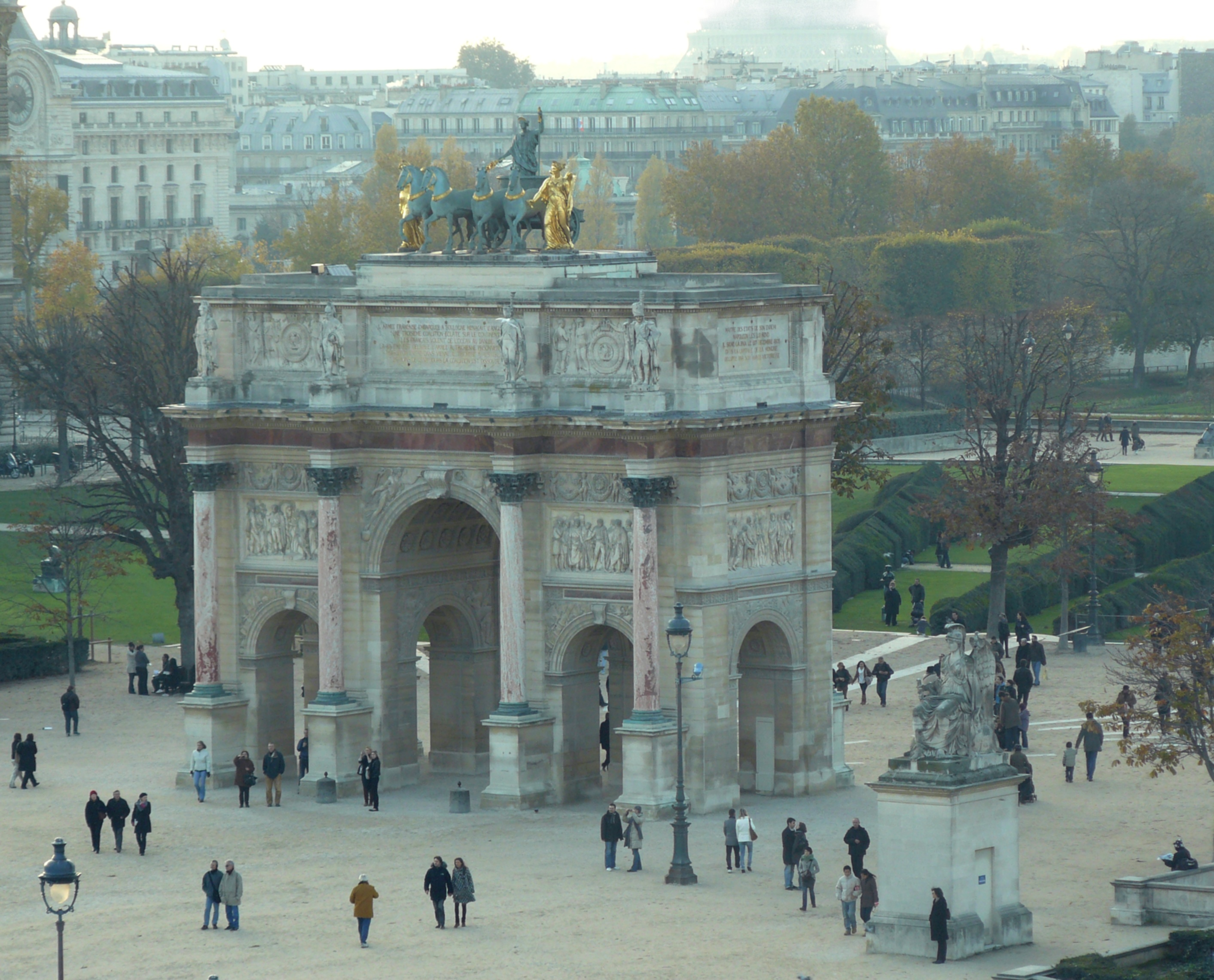 L'arc du Carrousel vu du 2ème étage du Louvre